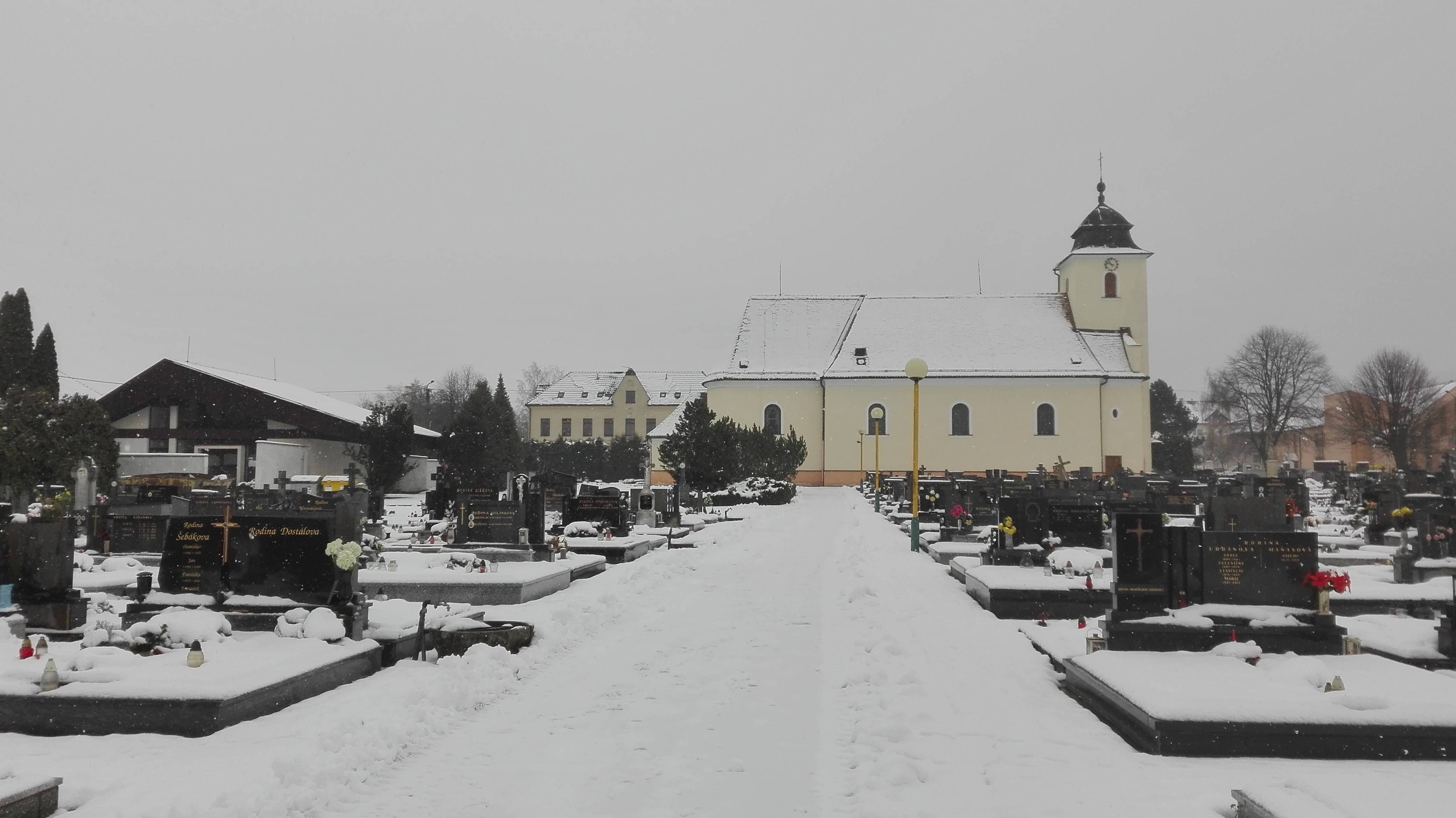 kostel v zimě